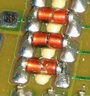 SMD MELF-Bauform, zylindrisch, mit Metallelektroden (Metal Electrode Faces)